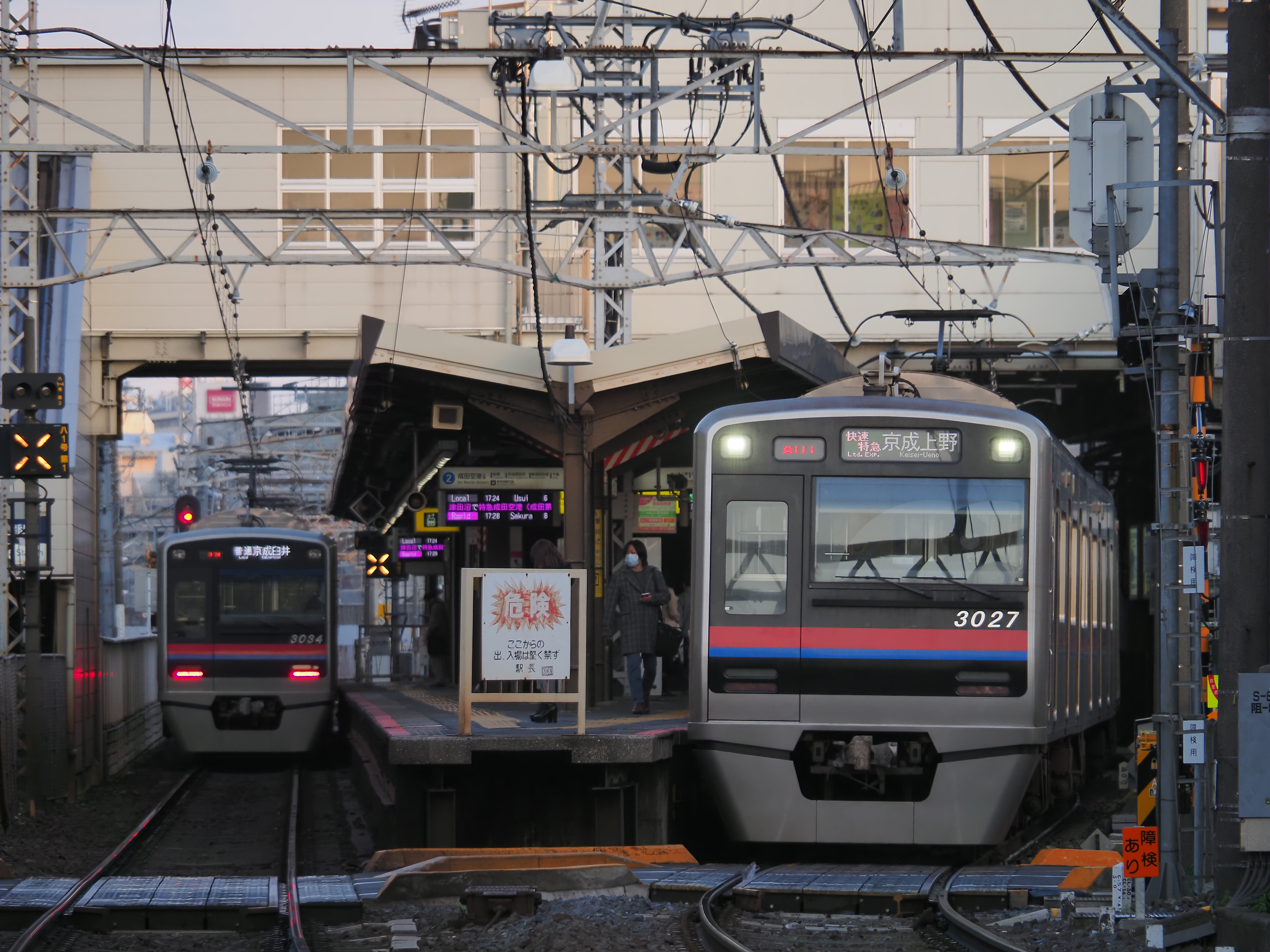 京成八幡駅を発車する3000系電車。